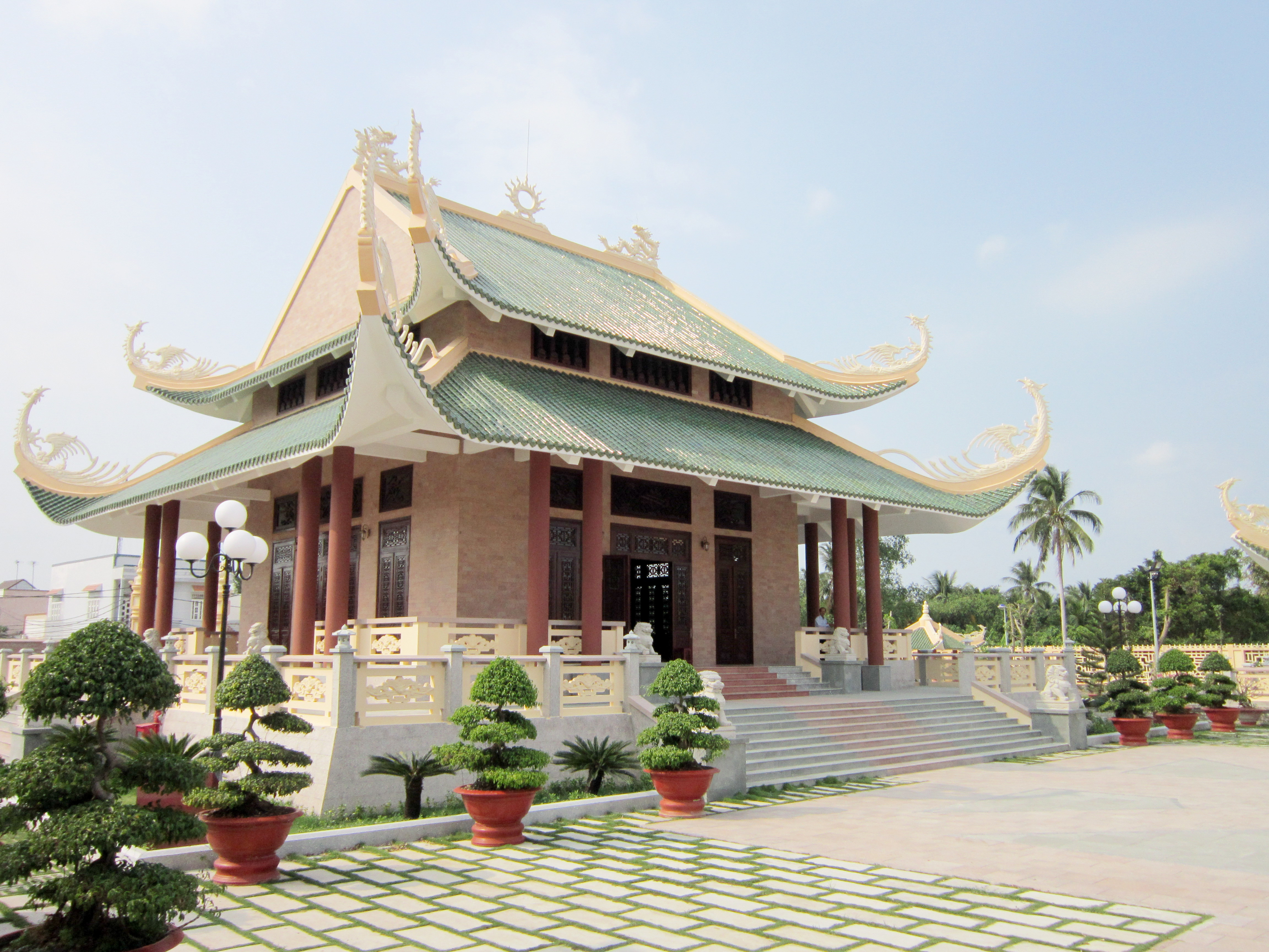 Nhà thờ Bùi Hữu Nghĩa (1807 - 1872) trong Khu tưởng niệm ông, nằm trên đường Huỳnh Mẫn Đạt; thuộc phường Bùi Hữu Nghĩa, quận Bình Thủy, thành phố Cần Thơ, Việt Nam.